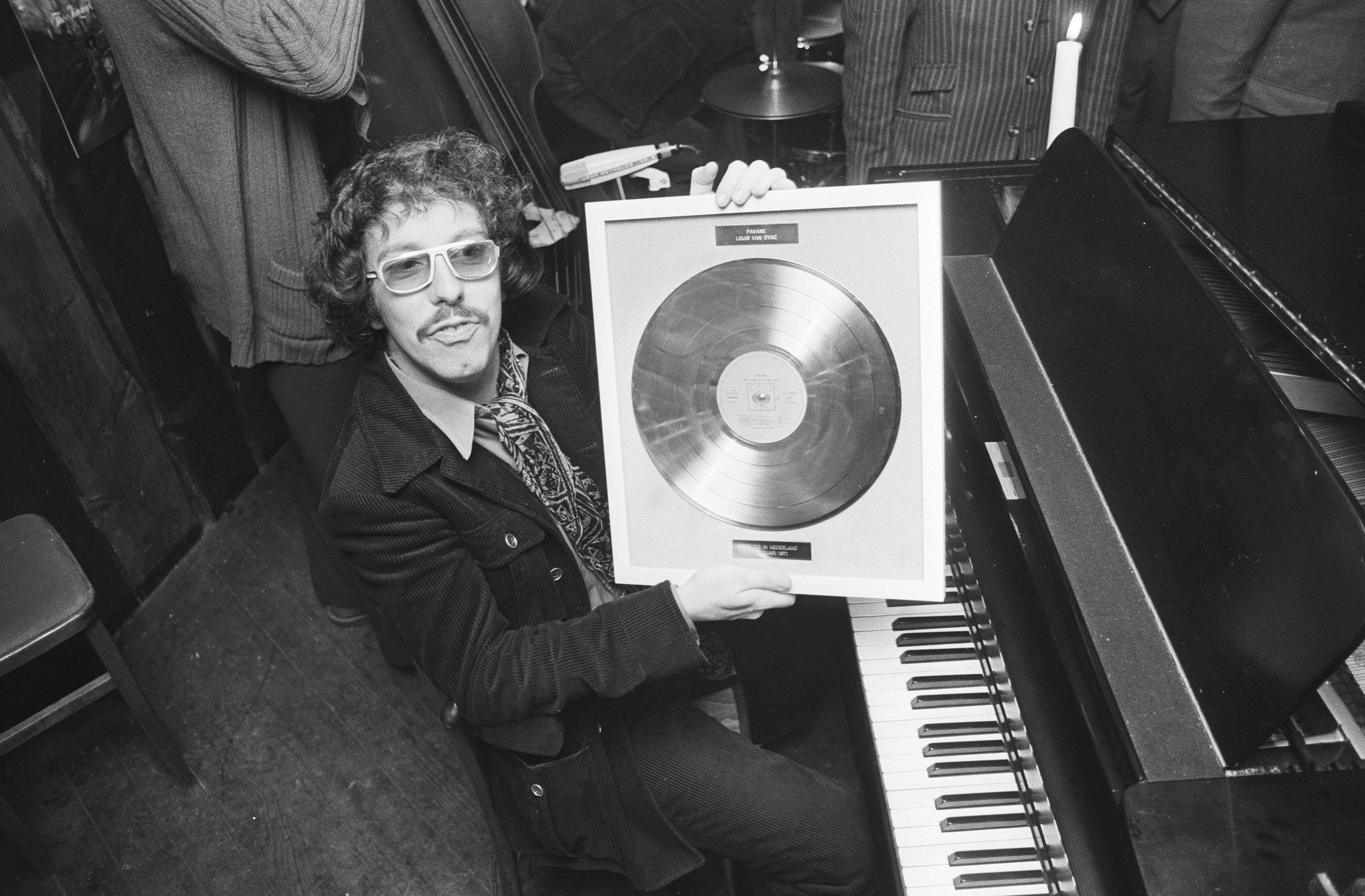 Collectie / Archief : Fotocollectie Anefo Reportage / Serie : [ onbekend ] Beschrijving : Pianist Louis van Dijk krijgt eerste Gouden LP in jachthaven Van Dijk , Oost-Loosdrecht; Louis van Dijk met LP Datum : 20 januari 1971 Trefwoorden : Pianisten, lps Fotograaf : Verhoeff, Bert / Anefo Auteursrechthebbende : Nationaal Archief Materiaalsoort : Negatief (zwart/wit) Nummer archiefinventaris : bekijk toegang 2.24.01.05 Bestanddeelnummer : 924-1907